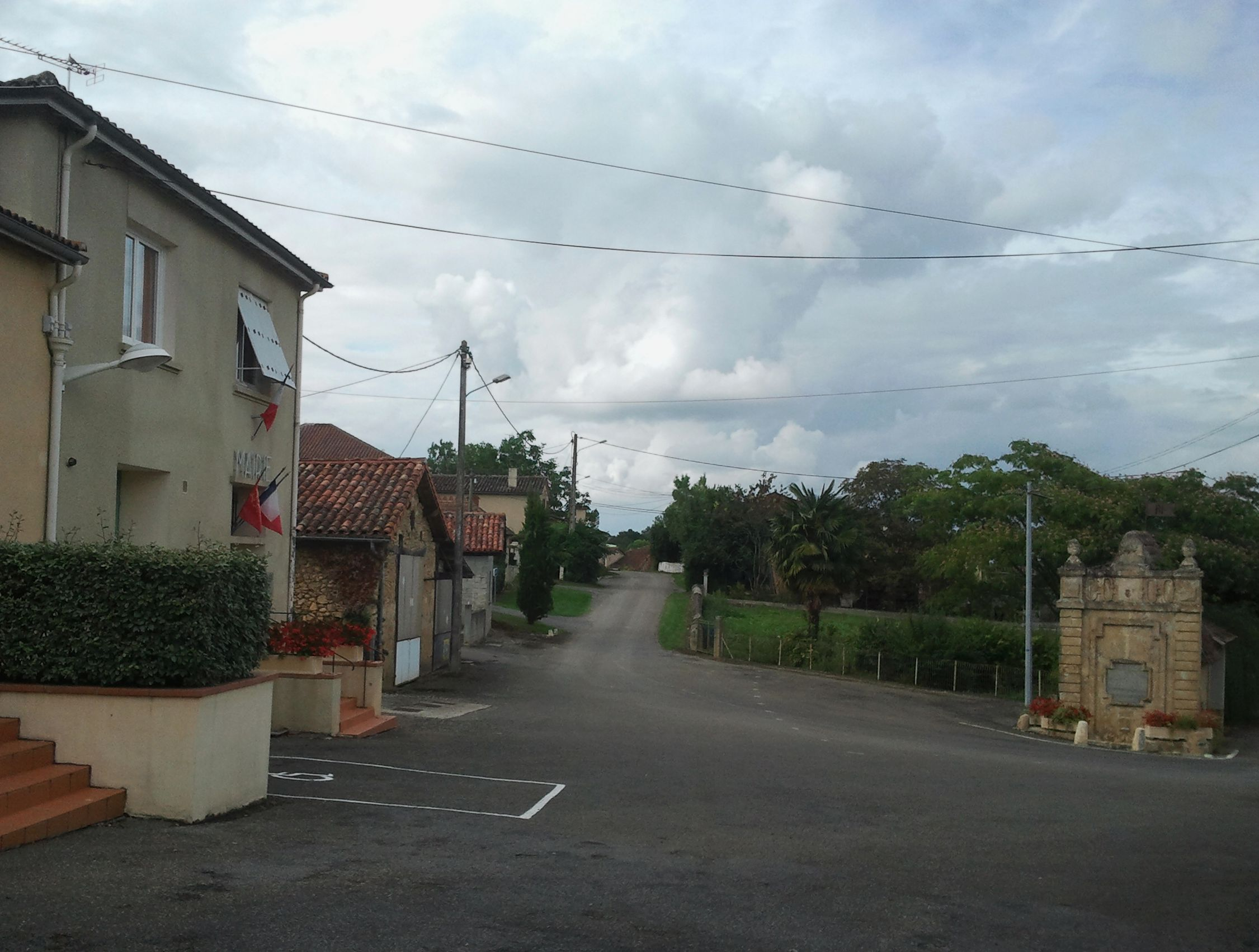 La place du village à Orbessan